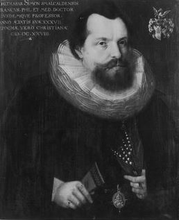 Ölgemälde in der Tübinger Professorengalerie